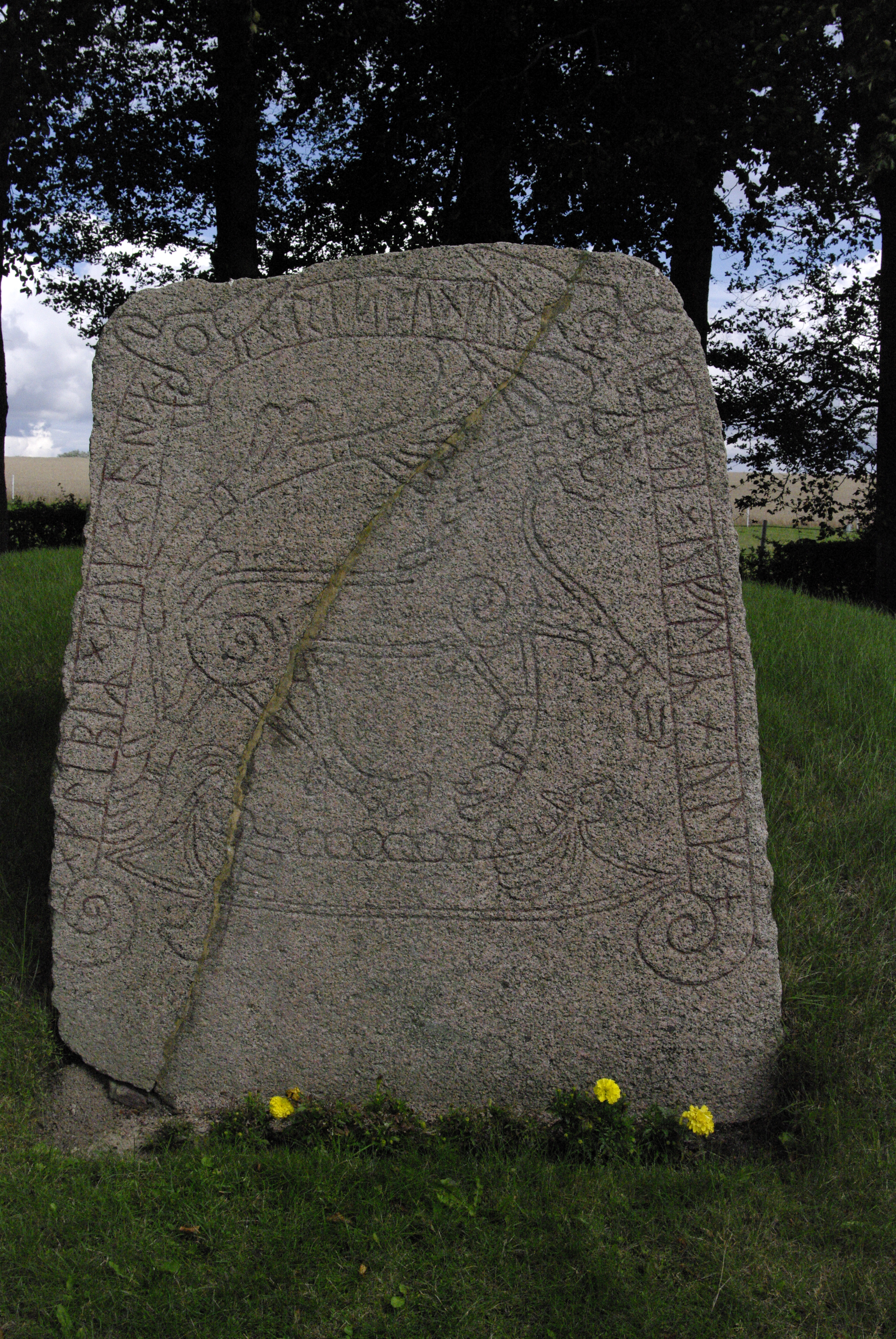 DR 271 vid Tullstorps kyrka.